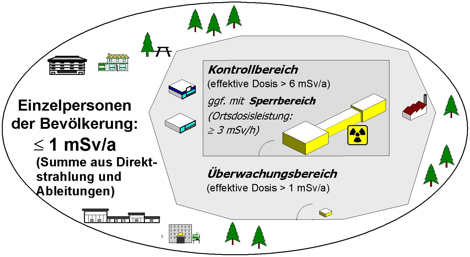 Strahlenschutzbereiche nach Strahlenschutzverordnung (StrlSchV): Überwachungsbereich, Kontrollbereich, Sperrbereich; letztere als Teil des Kontrollbereichs.